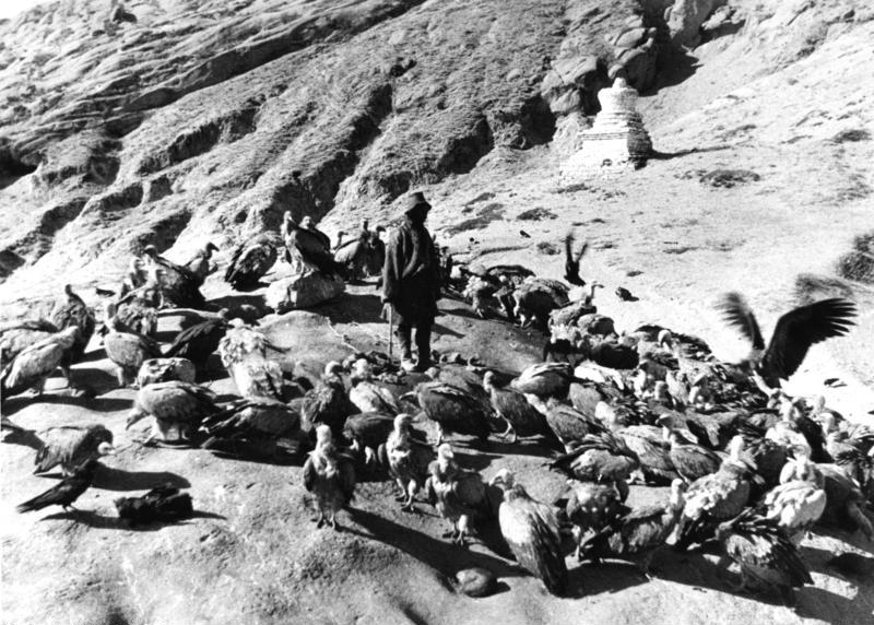 Lhasa, Leichenzerschneidung